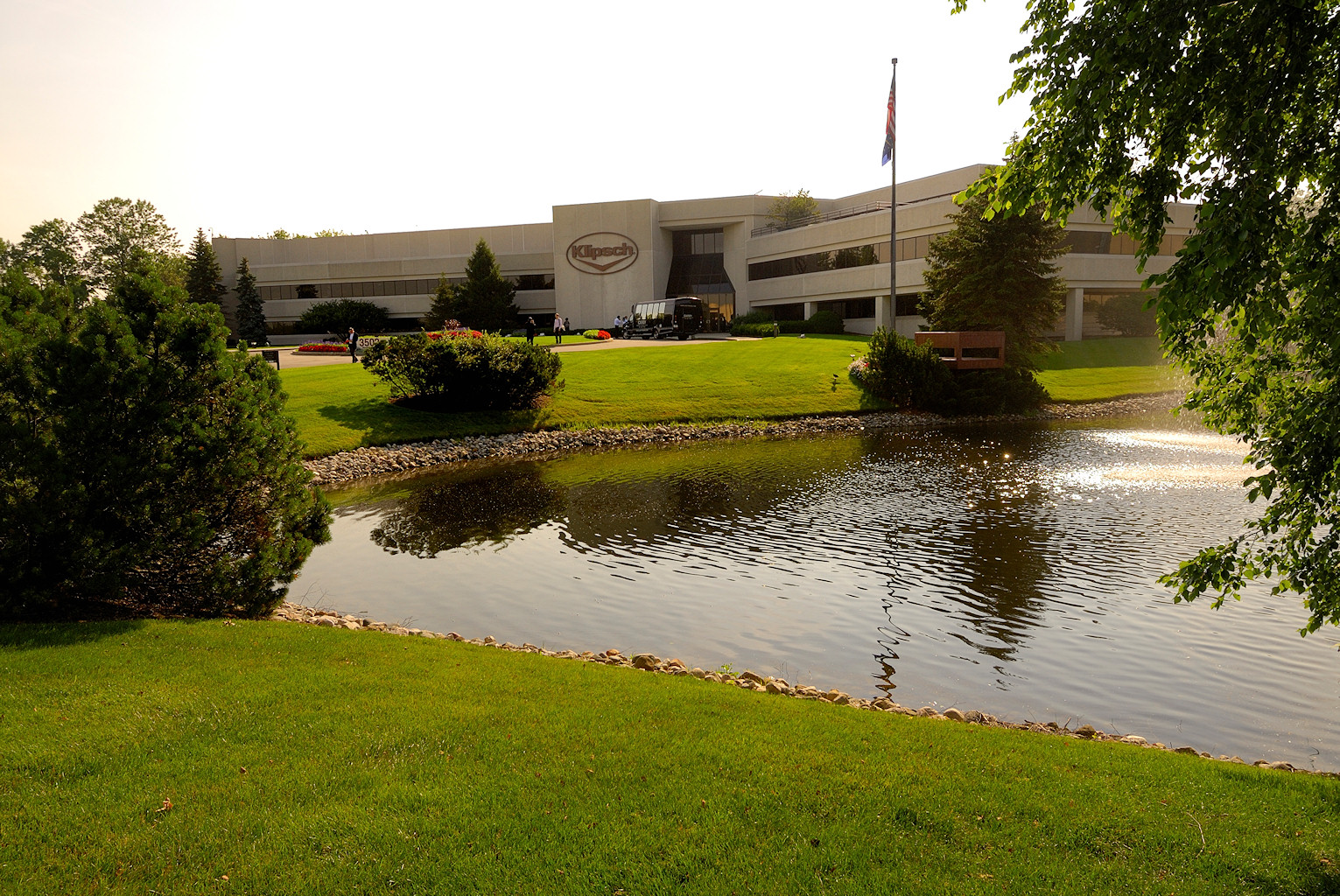 Le siège de Klipsch à Indianapolis